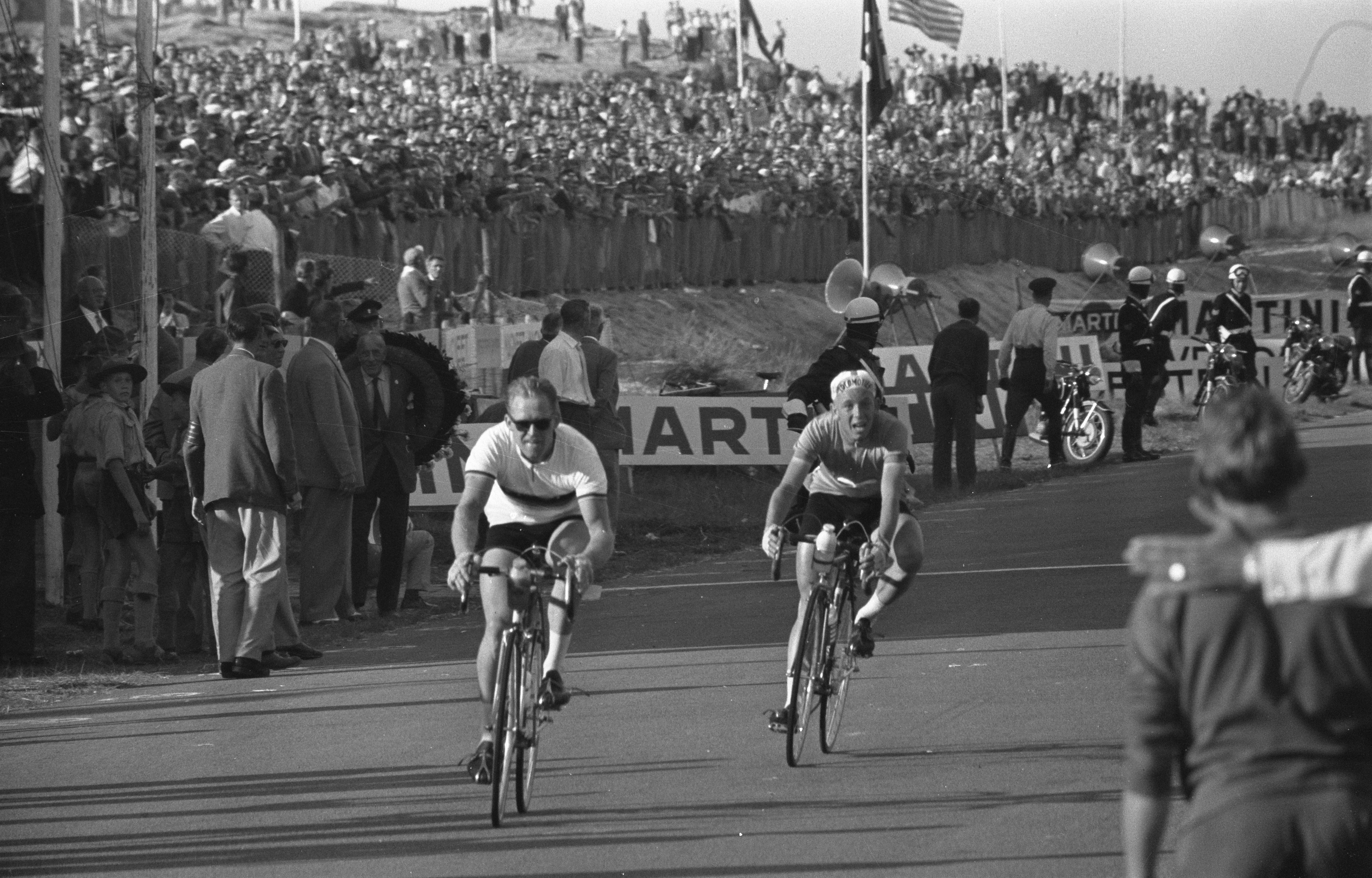 Collectie / Archief : Fotocollectie Anefo Reportage / Serie : [ onbekend ] Beschrijving : Wereldkampioenschappen wielrennen amateurs op de weg te Zandvoort, G. Schur (links) eerste en Maliepaard tweede Datum : 15 augustus 1959 Fotograaf : Rossem, Wim van / Anefo Auteursrechthebbende : Nationaal Archief Materiaalsoort : Negatief (zwart/wit) Nummer archiefinventaris : bekijk toegang 2.24.01.05 Bestanddeelnummer : 910-5981